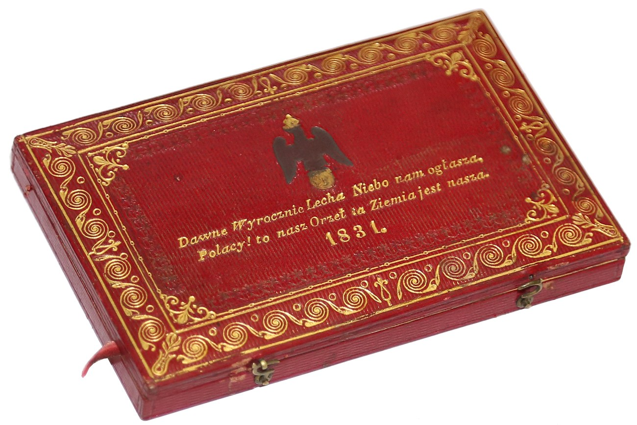 Pudełko 1831 wyrocznie